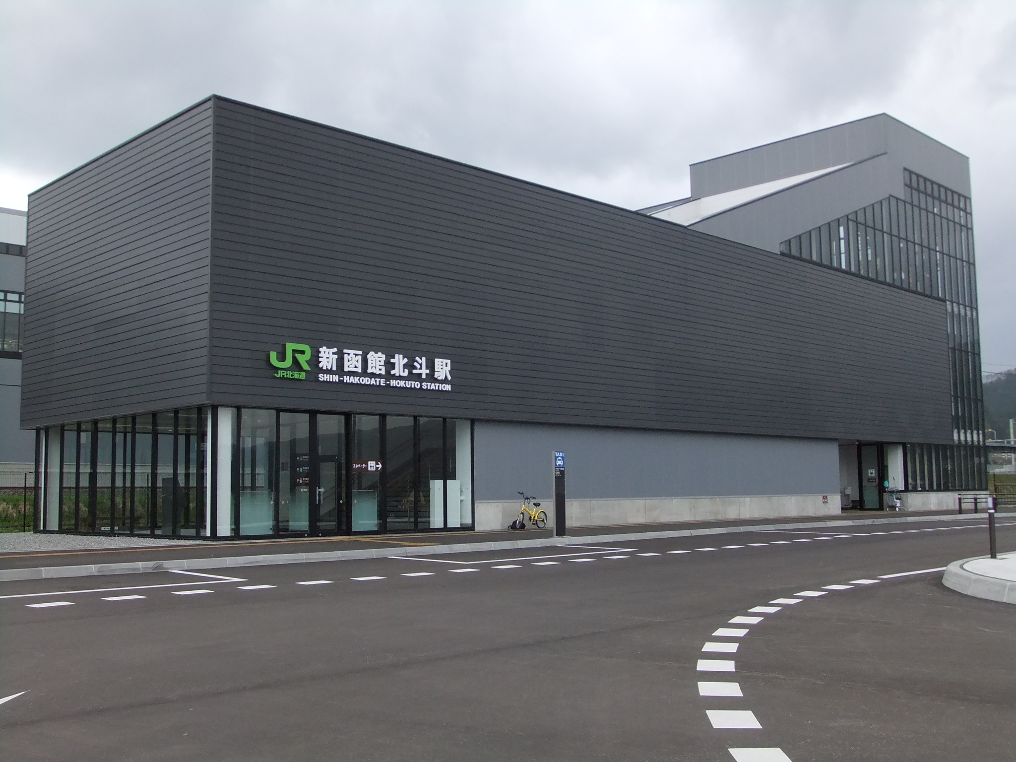 JR北海道新函館北斗駅北口